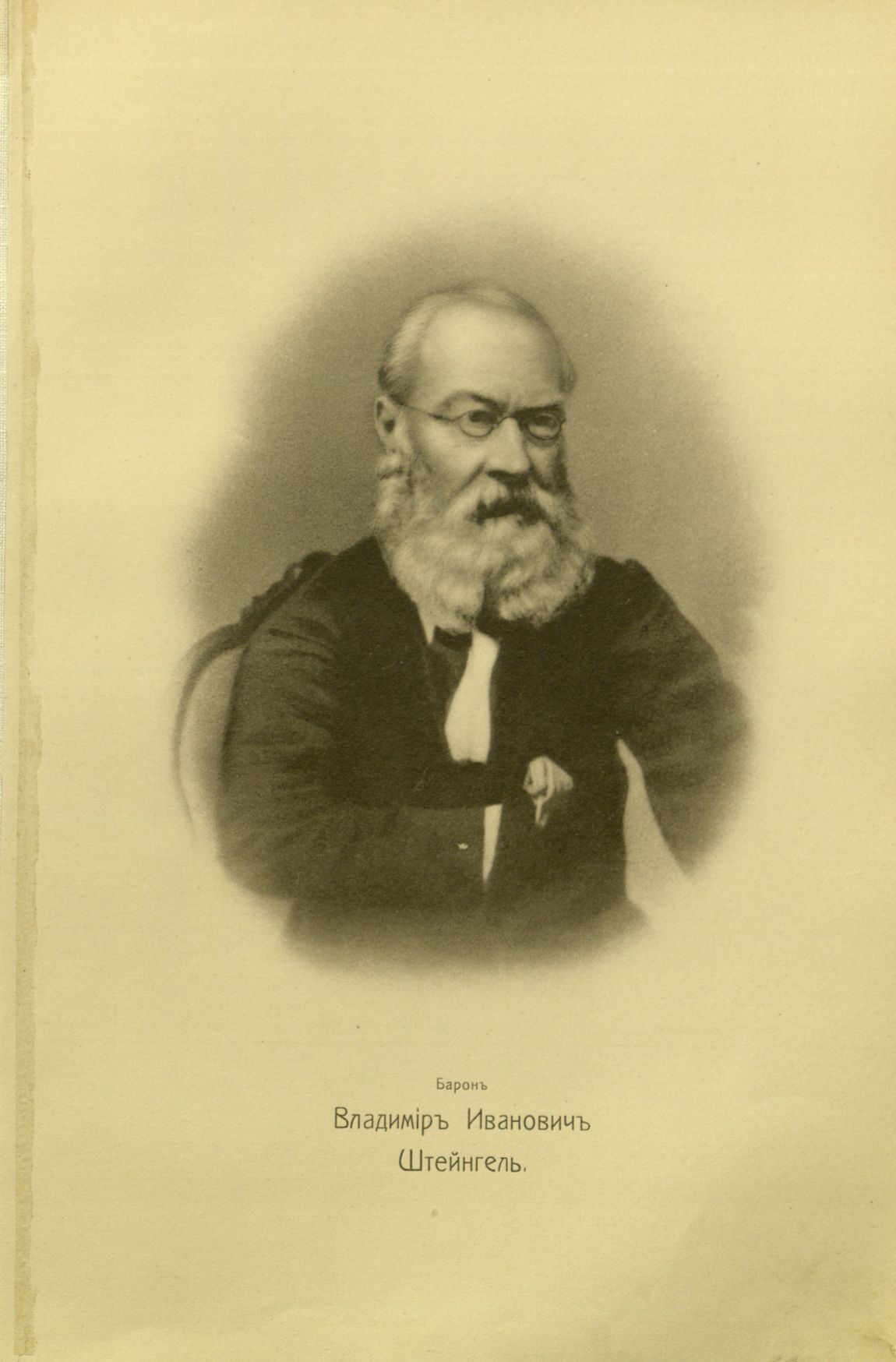 Штейнгейль, Владимир Иванович